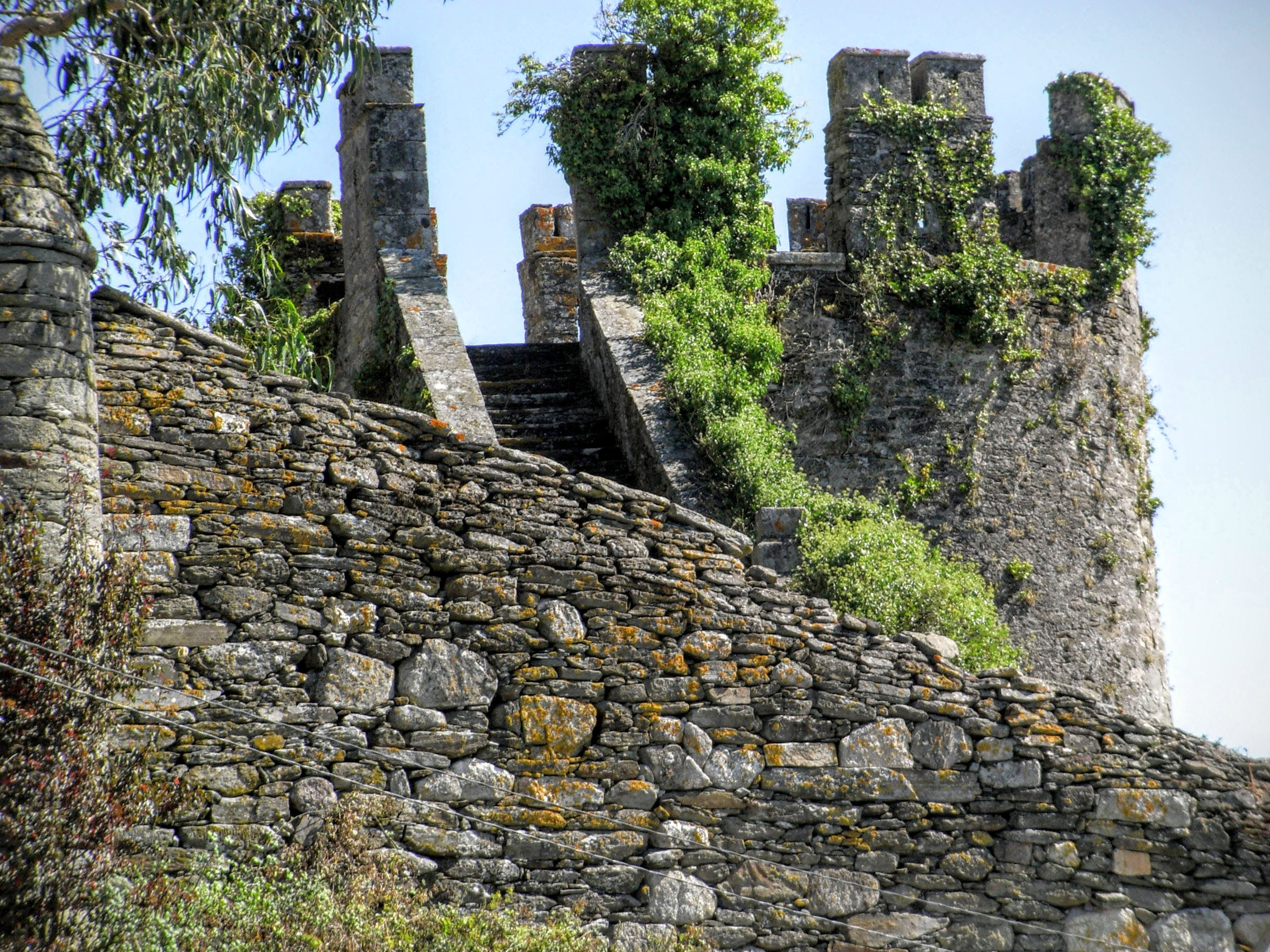 Castillo. Torre de Vilar